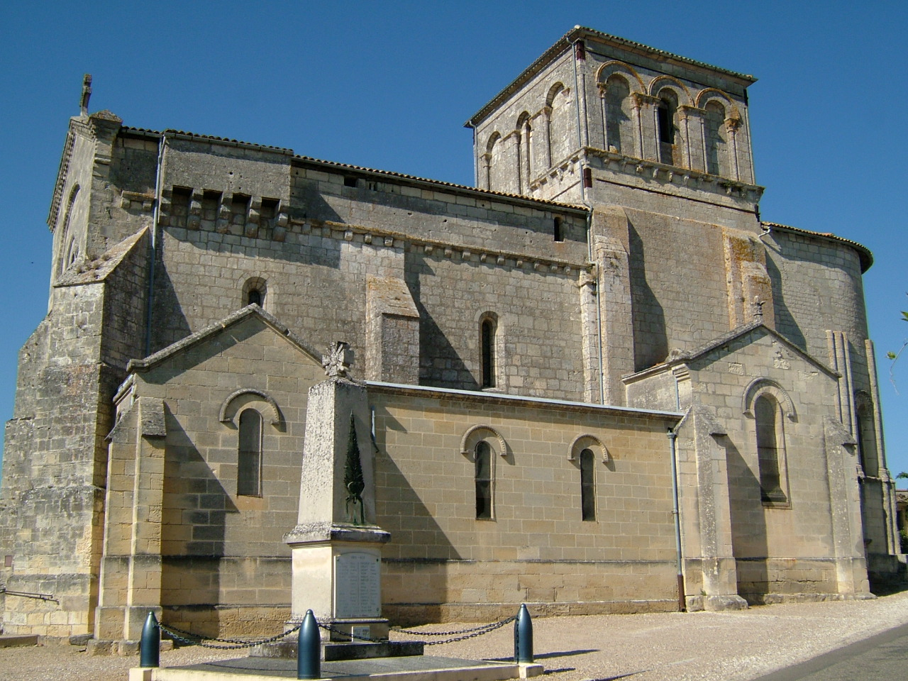 Saint-Gervais, Gironde (France) ; vue d'ensemble de l'église.